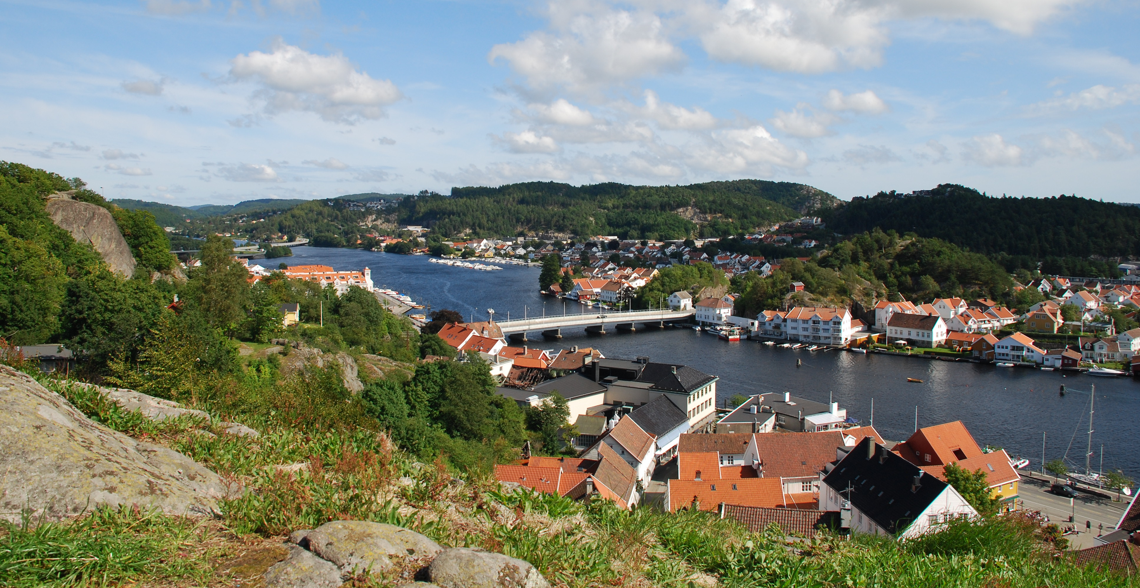 Mandal sentrum ved Mandalselva og broa